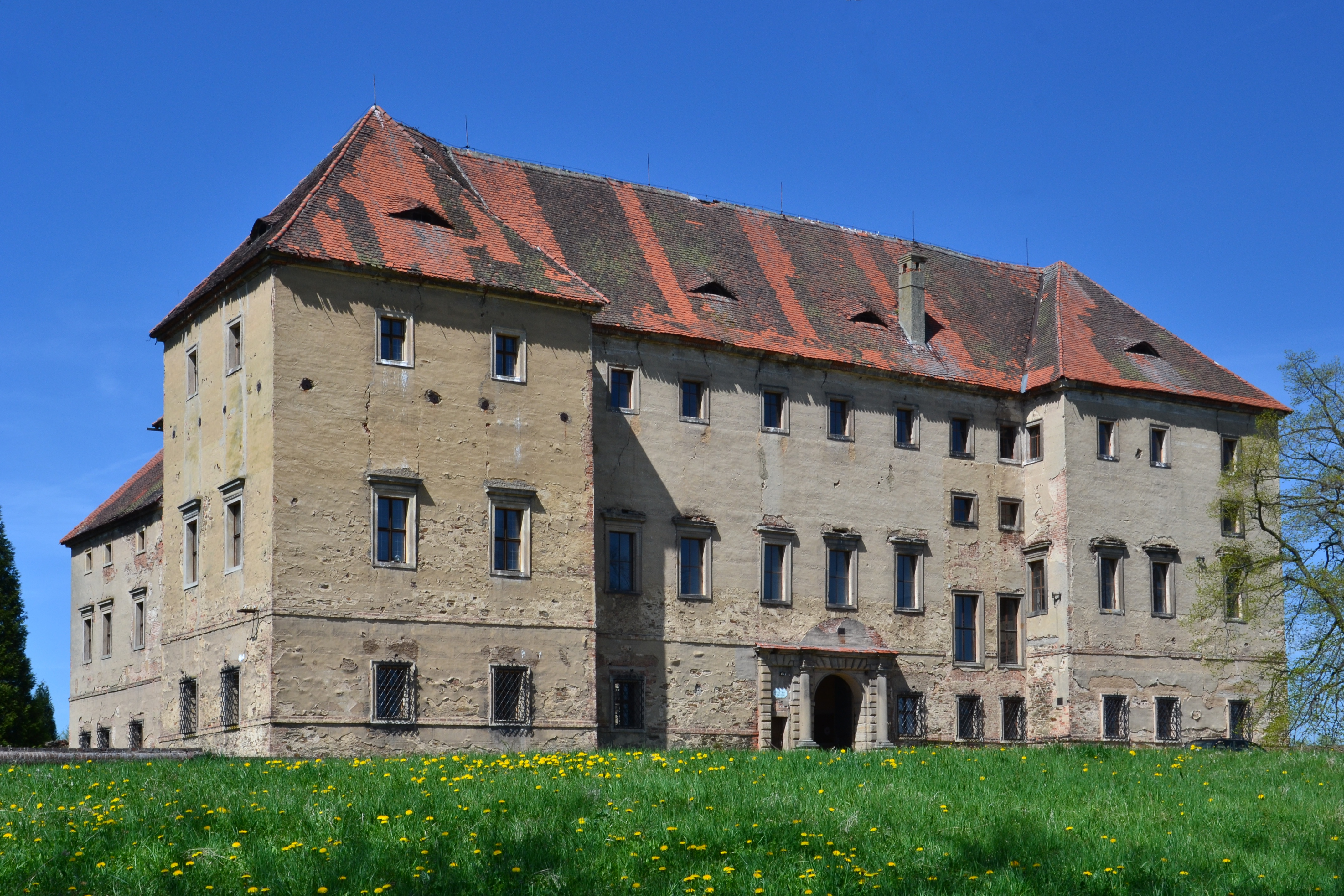 Průčelí zámku